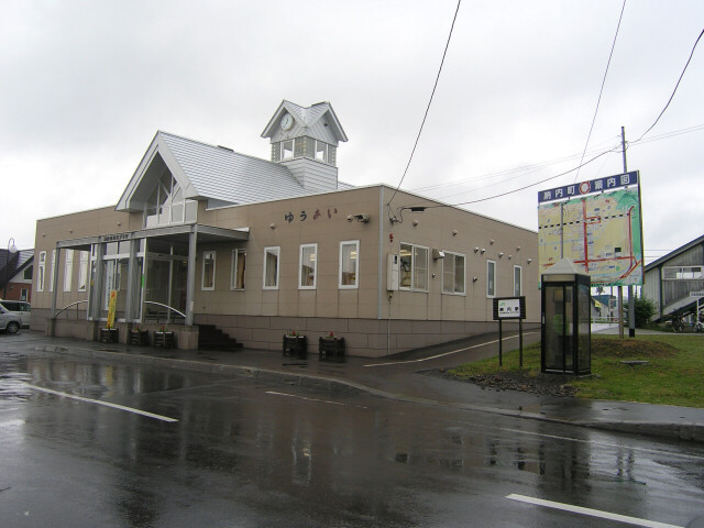 Osamunai Station in Hakodate Main Line, Japan